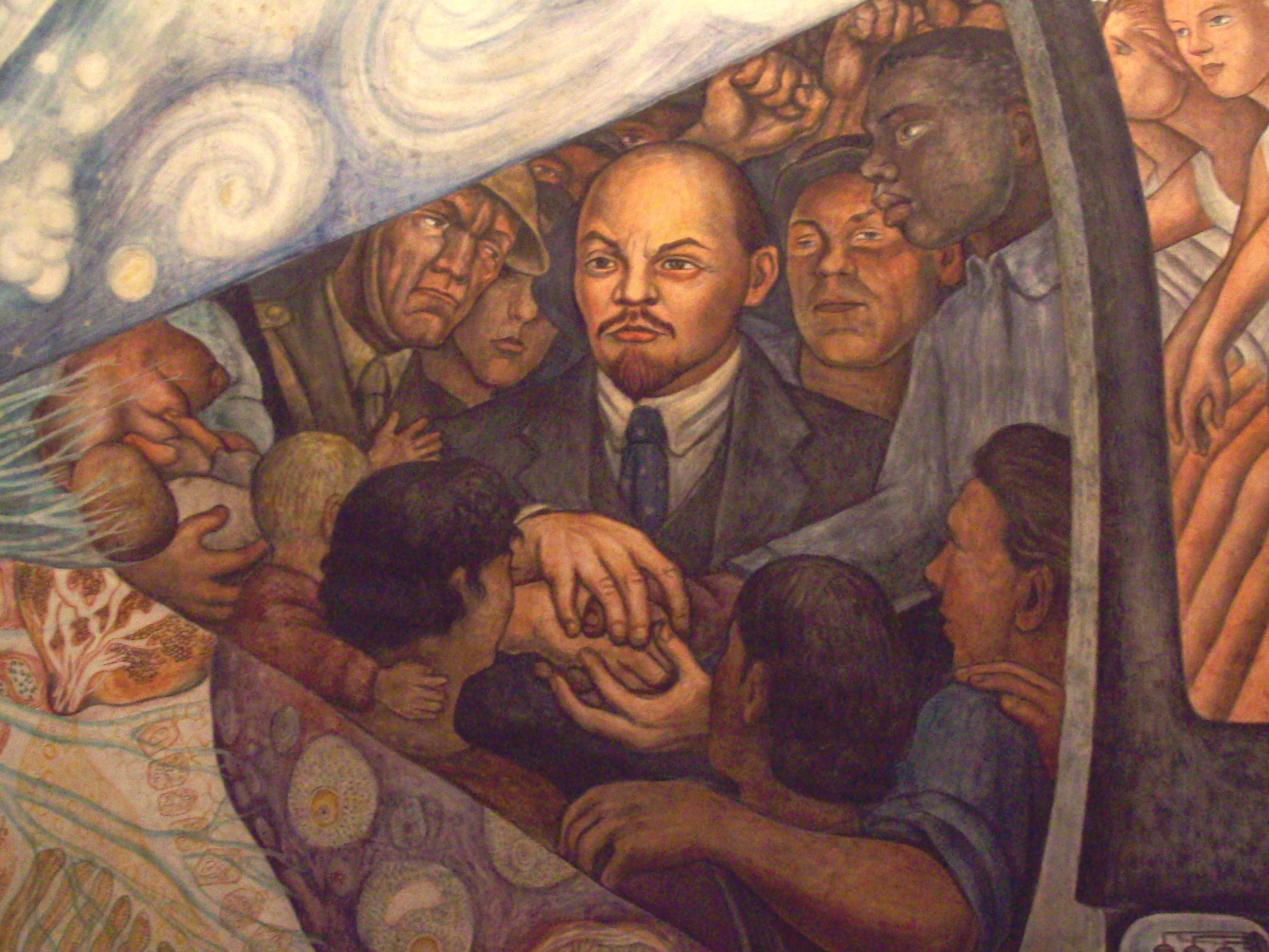 Detalle de Lenin en la obra El hombre en el cruce de caminos (1934) de Diego Rivera, mural en exhibición permanente en el Palacio de Bellas Artes de la Ciudad de México